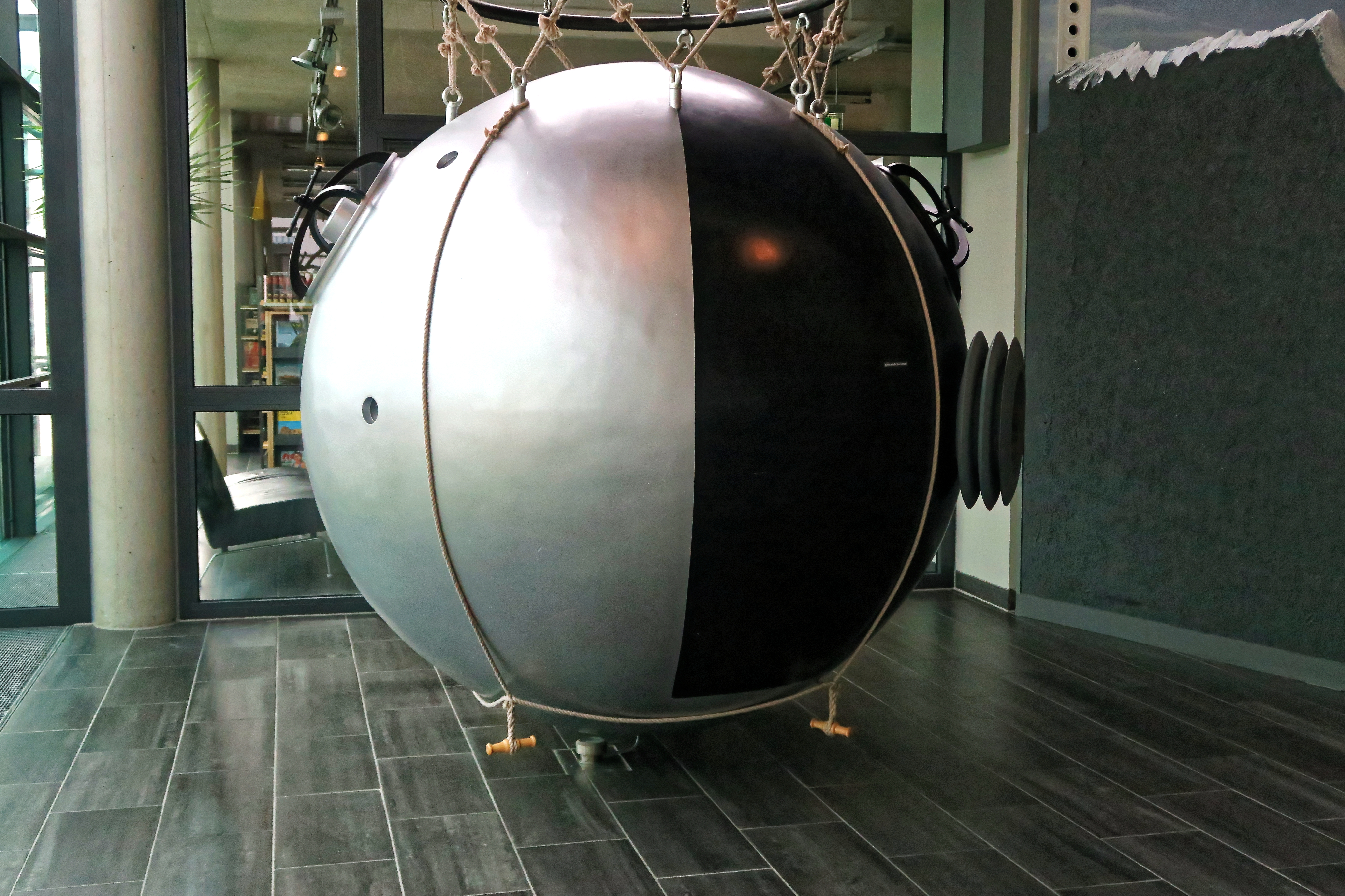 Szenen und Details des Ballonmuseums in Augsburg-Gersthofen